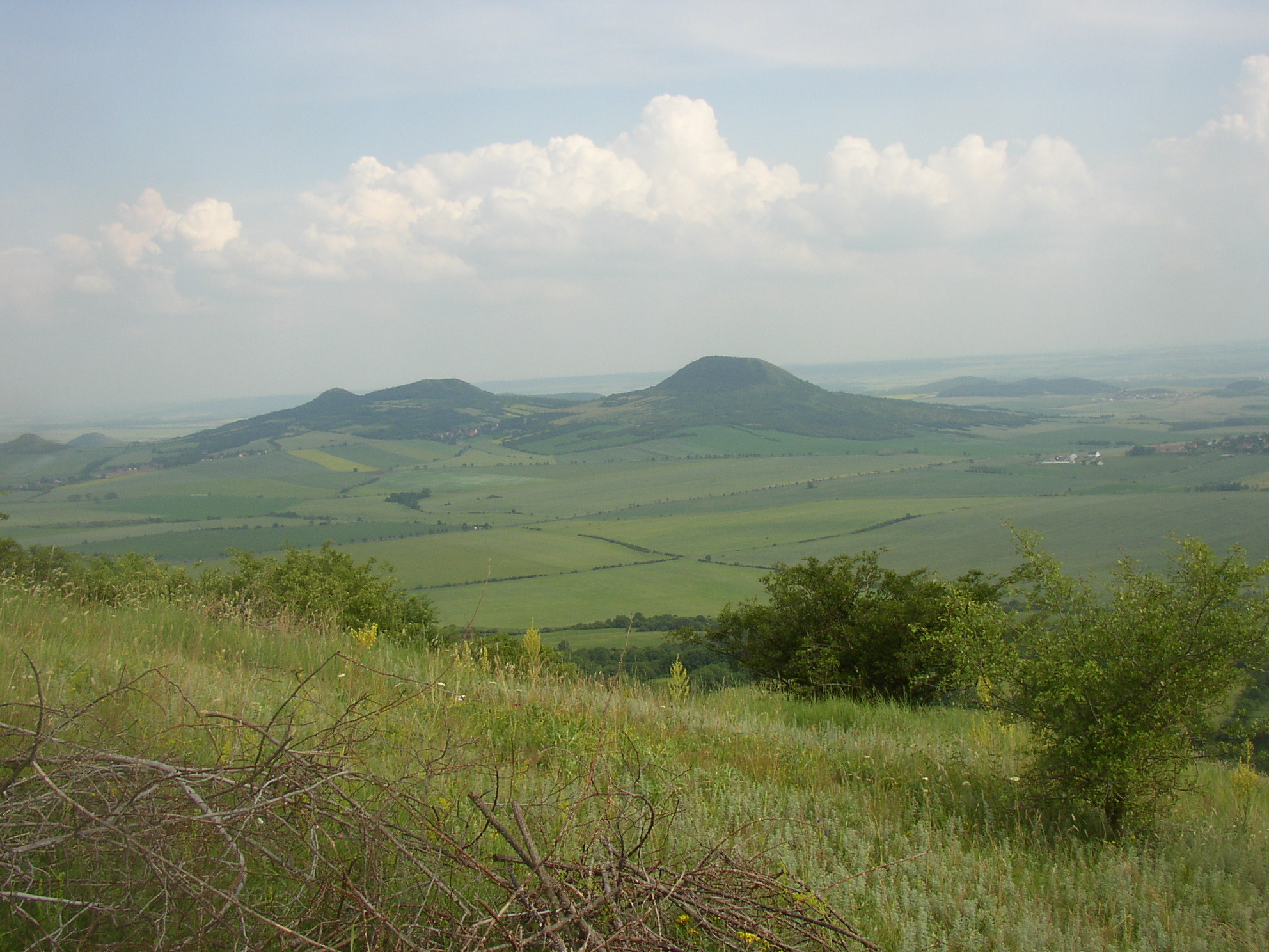 České středohoří. Pohled z Milé jihovýchodním směrem na (zprava doleva) Oblík, Srdov a Brník.